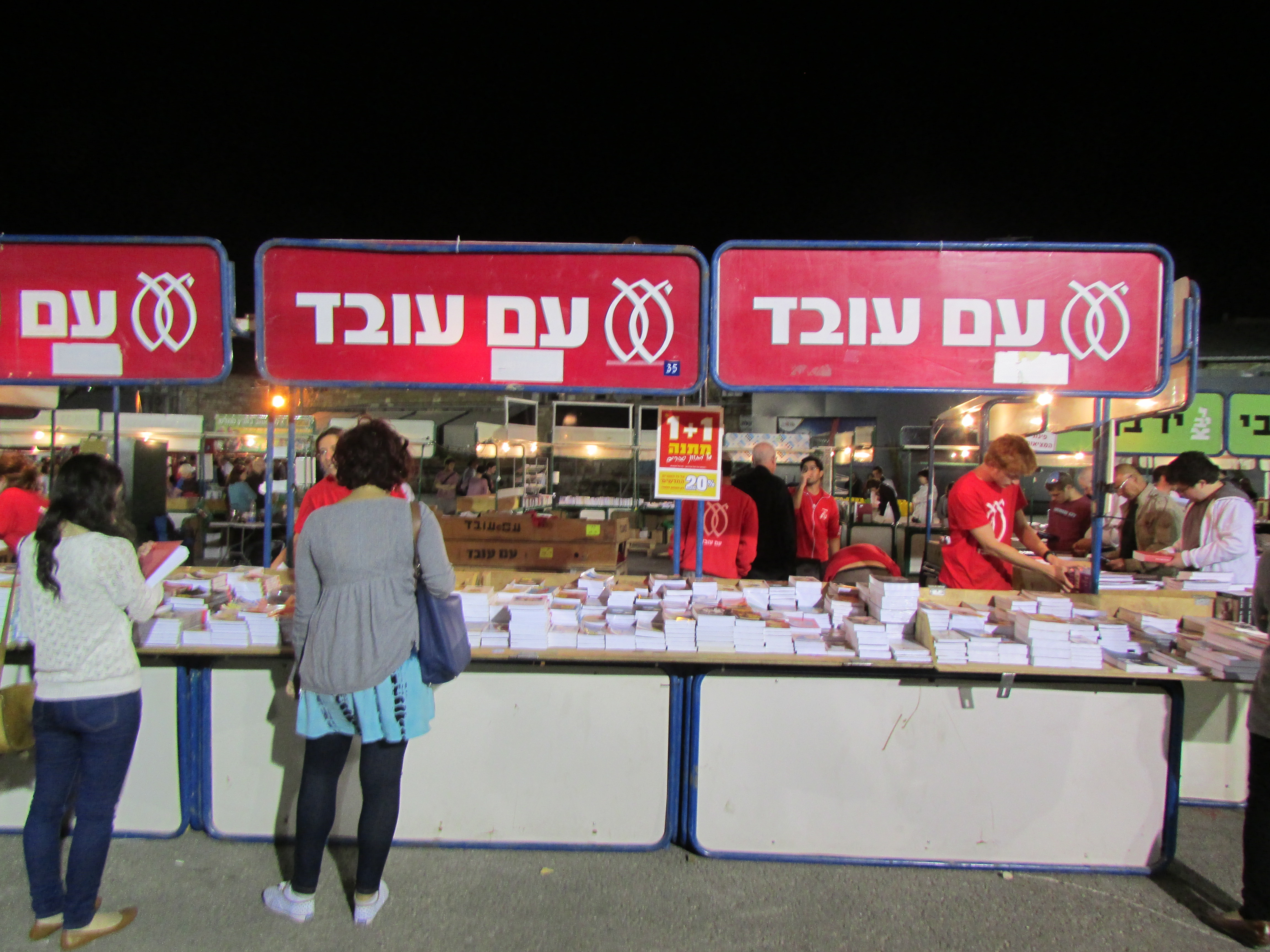 Jerusalem Hebrew book week fair